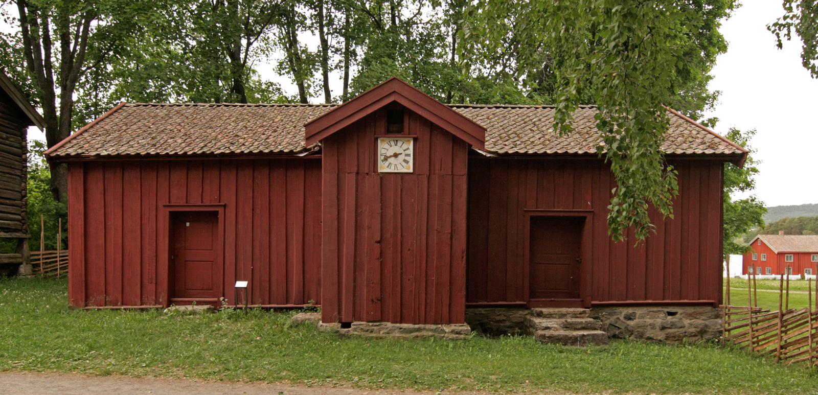 Borgstue fra Vang prestegard, Hedmark. Bygd 1732. I dag på Hedmarksmuseet, Hamar.